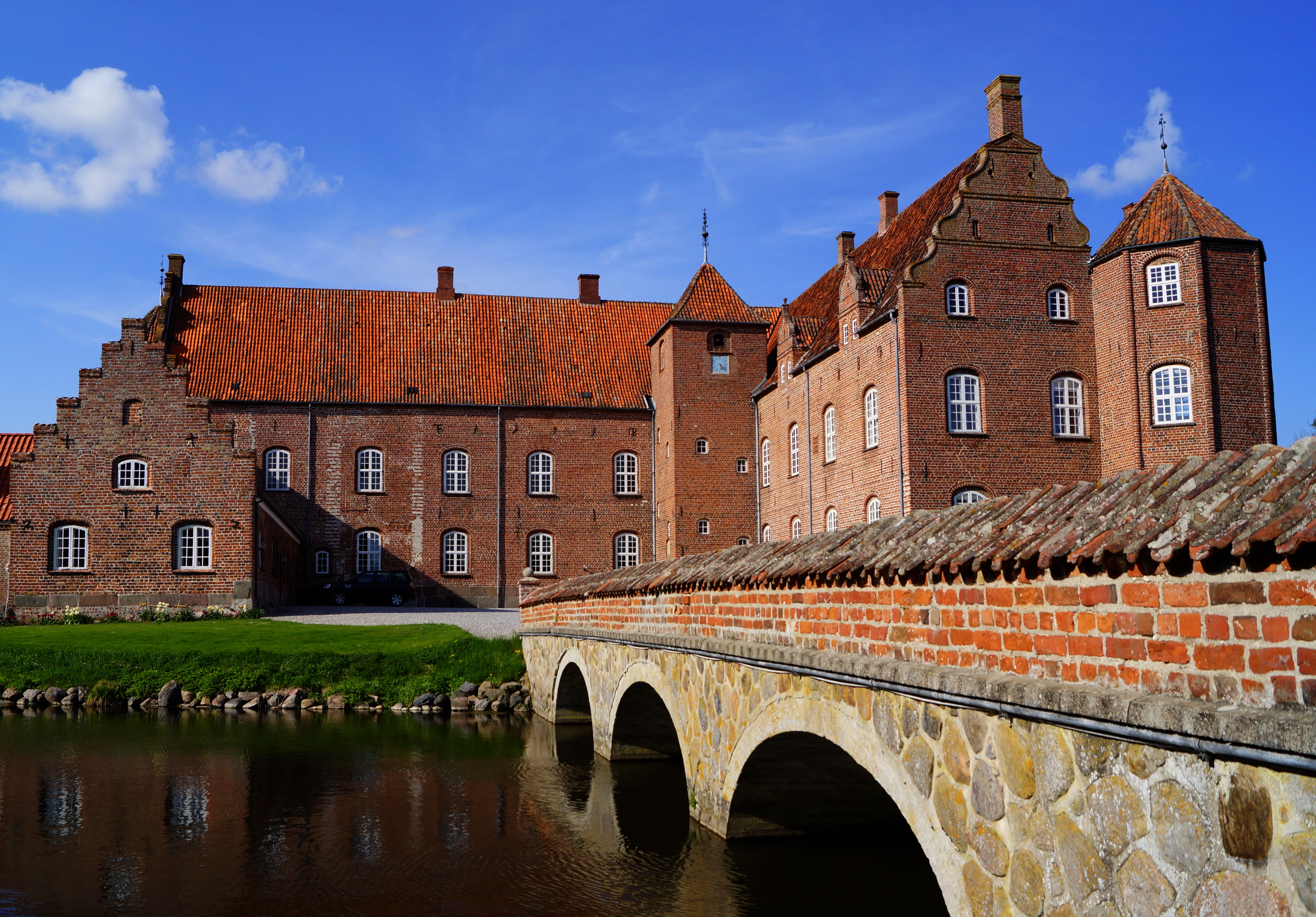 Katholm Slot